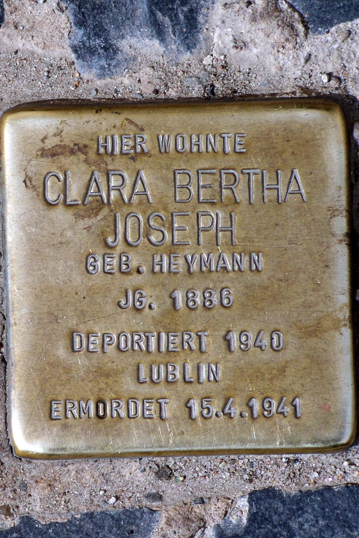 Stolperstein für Clara Bertah Joseph in Stralsund.